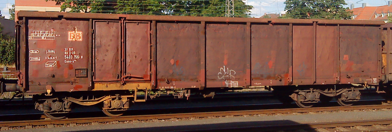 Dieser Waggon ging aus einem von ANF-Industrie an die DR gelieferten Eas-Wagen hervor. Zwischen 1999 und 2002 werden etwa 1.360 der inzwischen als Eas 066 bezeichneten Fahrzeuge mit Stahlfußboden ausgerüstet. Gleichzeitig werden die Stirnklappen festgelegt (verschweißt) und die Wagen zu Eaos-x 057 umgezeichnet. {